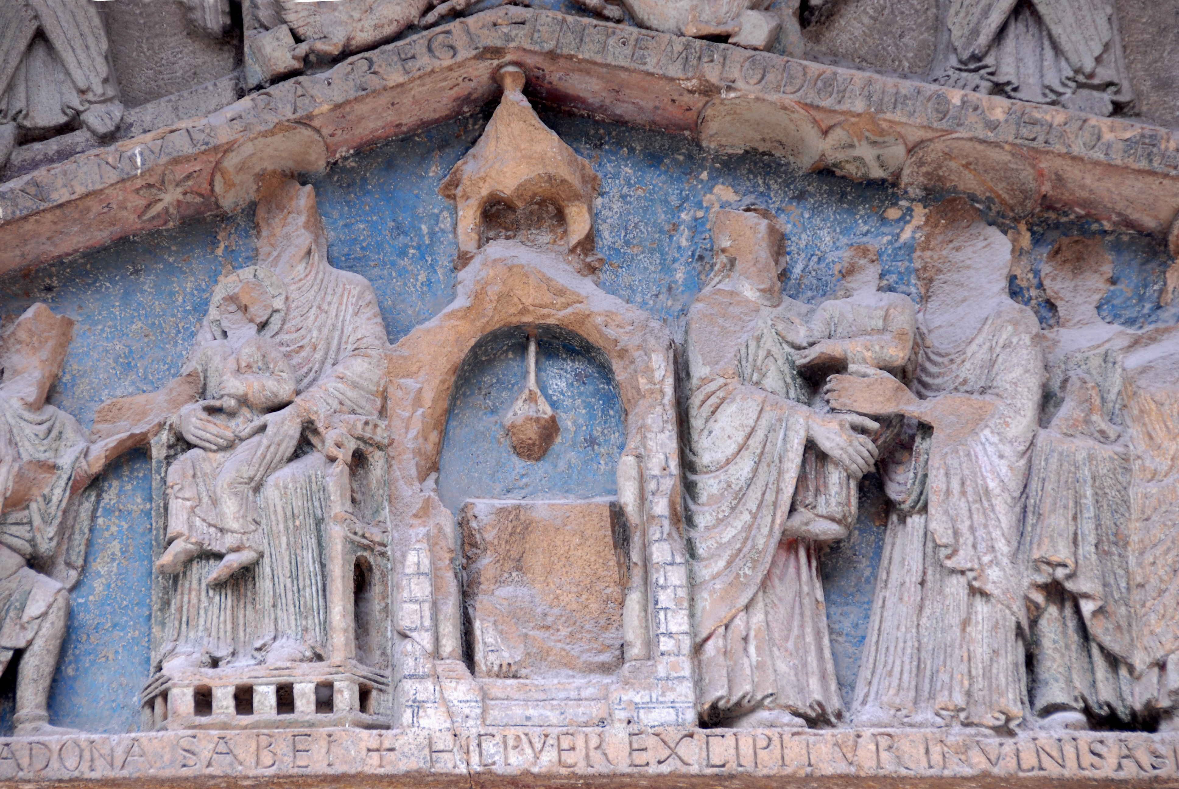 Notre-Dame du Port, Südportal, Sturzmitte